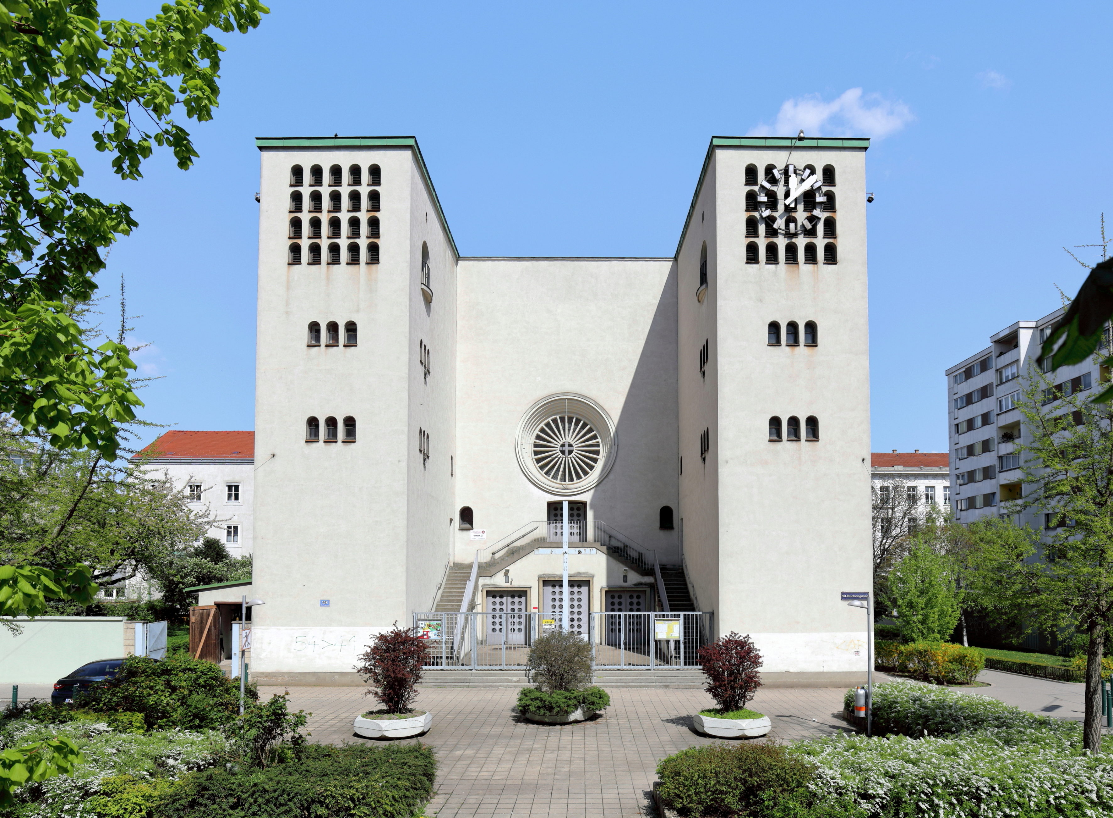 Südansicht der röm.-kath. Pfarrkirche Königin des Friedens an der Adresse Buchengasse 158 im 10. Wiener Gemeindebezirkes Favoriten.Der moderne Stahlbeton-Sakralbau wurde ab Herbst 1933 (Grundsteinlegung am 3. September 1933) nach Entwürfen der Architekten Leo Schmoll und Robert Kramreiter errichtet und am 16. November 1935 eingeweiht. Die Kirche hat eine Länge von 52 Meter und eine Breite von 22 Meter. Die Höhe des Kirchenschiffs beträgt 16,5 Meter und ihr maximales Fassungsvermögen beläuft sich auf etwa 3000 Personen, davon 480 Sitzplätze.